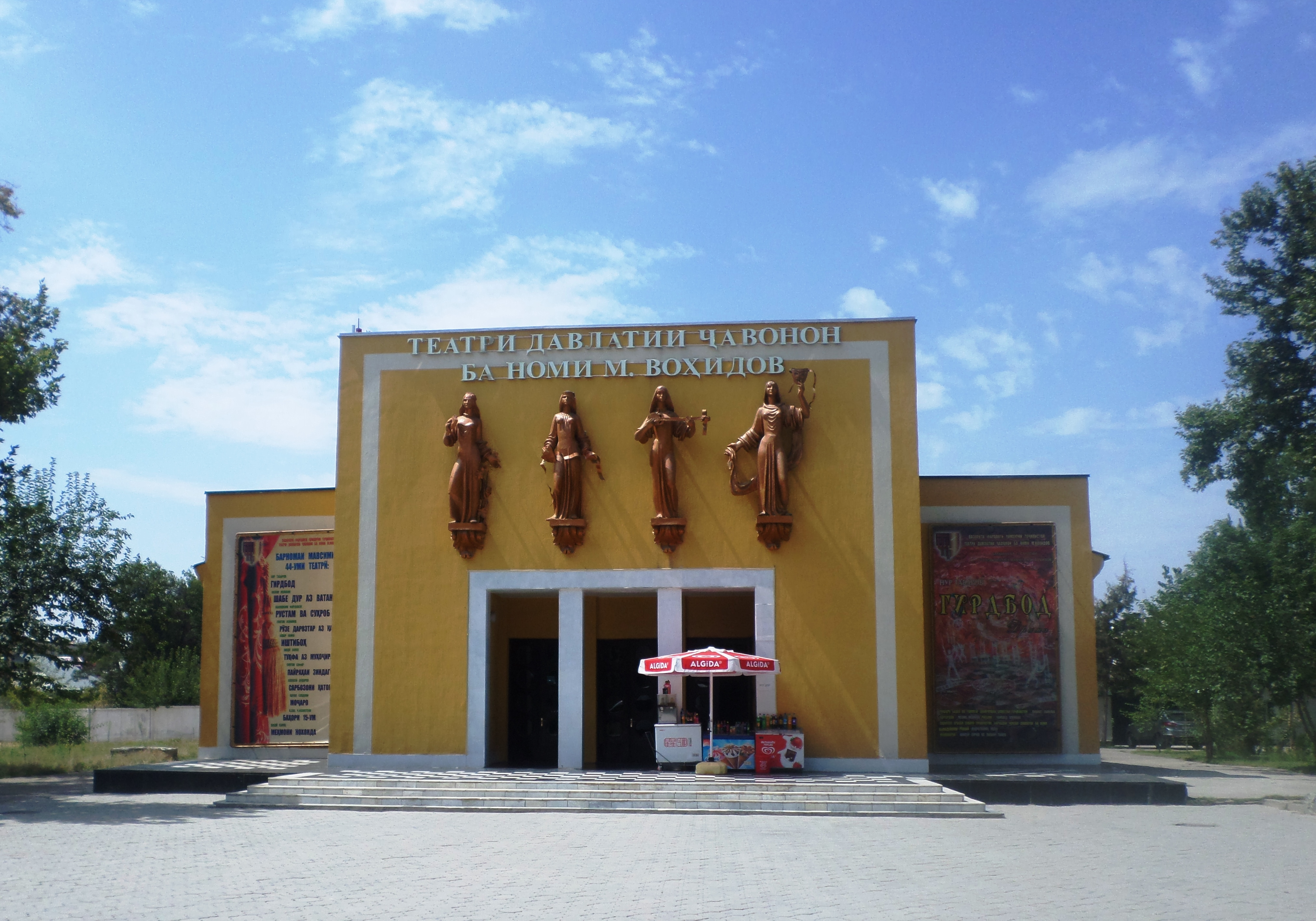 Молодехный драматический театр. Душанбе, 2015 год